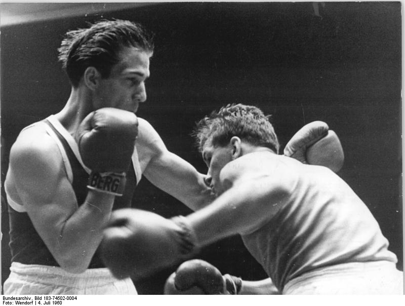 Rolf Caroli, Osorski Zentralbild Wendorf Wen-Fr - 4.7.1960 - 6 DDR-Boxer fahren nach Rom - Bei den Finalkämpfen am 3.7.1960 im Westberliner Sportpalast in den restlichen 5 Gewichtsgruppen gegen die westdeutschen Boxer sicherten sich Kirsch, Busse und Caroli die Fahrkarten für Rom. UBz: Rolf Caroli (DDR, links) sicherte sich im Halbmittelgewicht gegen Osorski (DDR) die Fahrkarte für Rom.